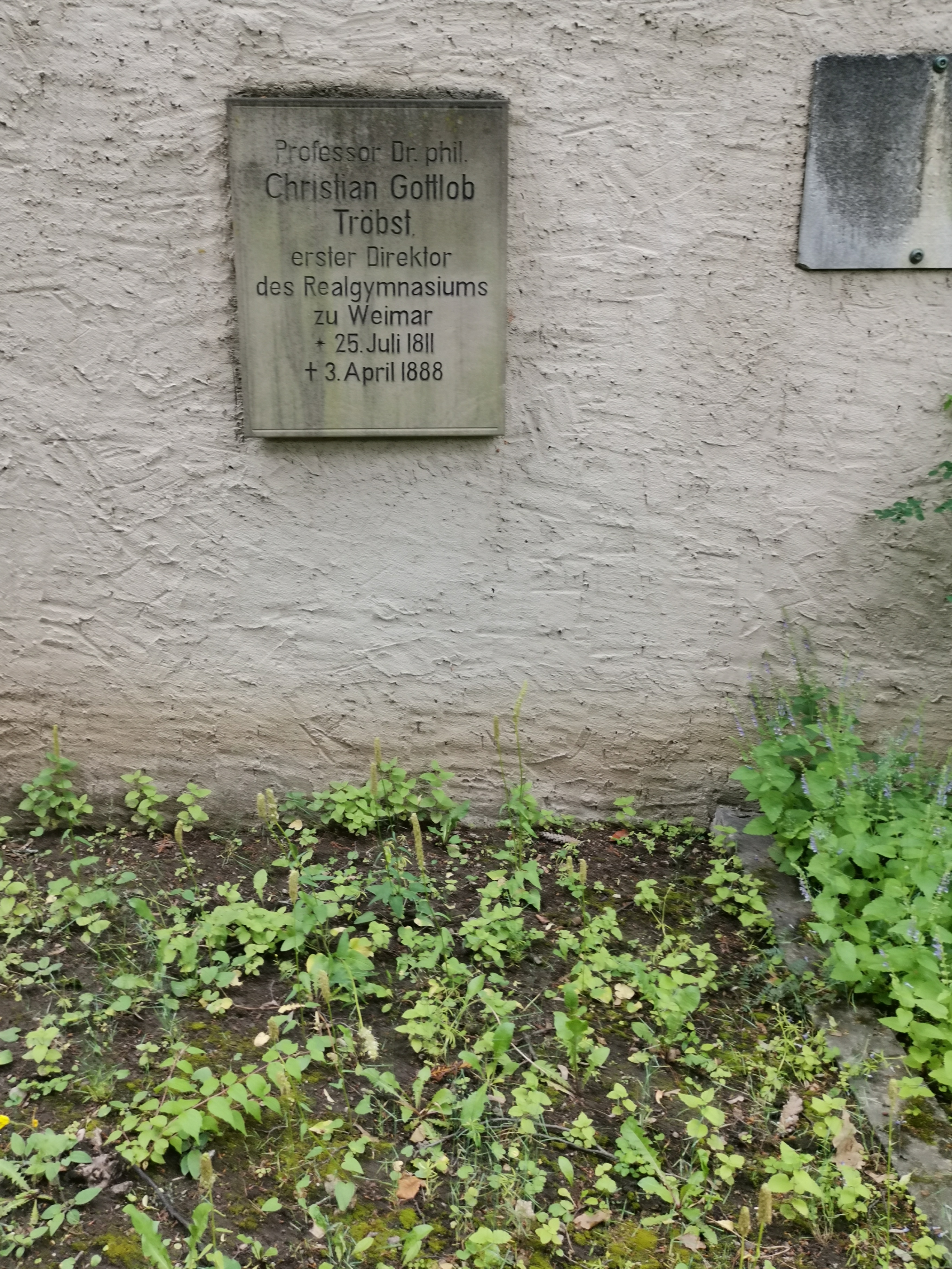 Grabstätte Christian Gottlob Tröbst; Historischer Friedhof Weimar